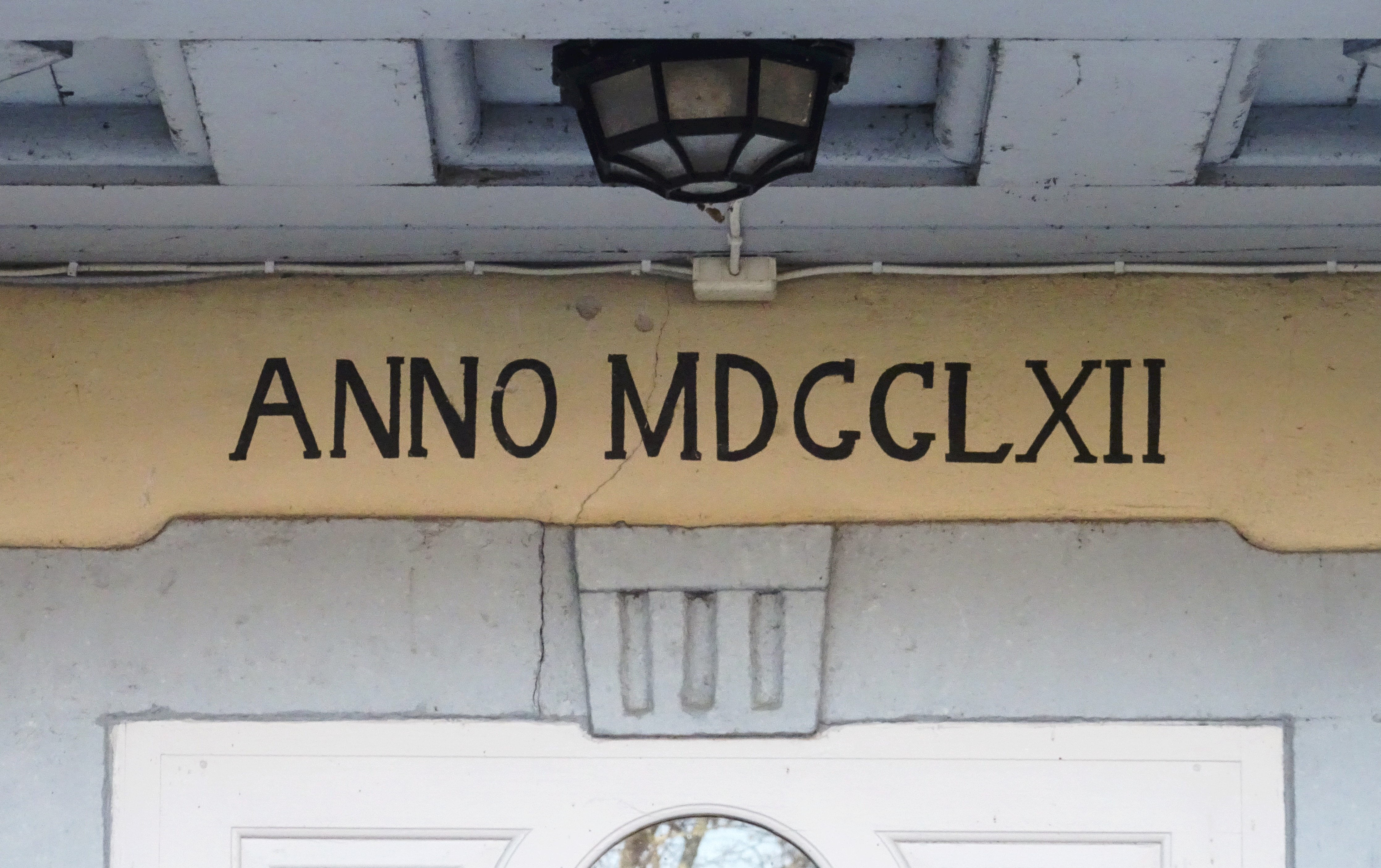 Riddersviks gård årtal "1762" över portalen